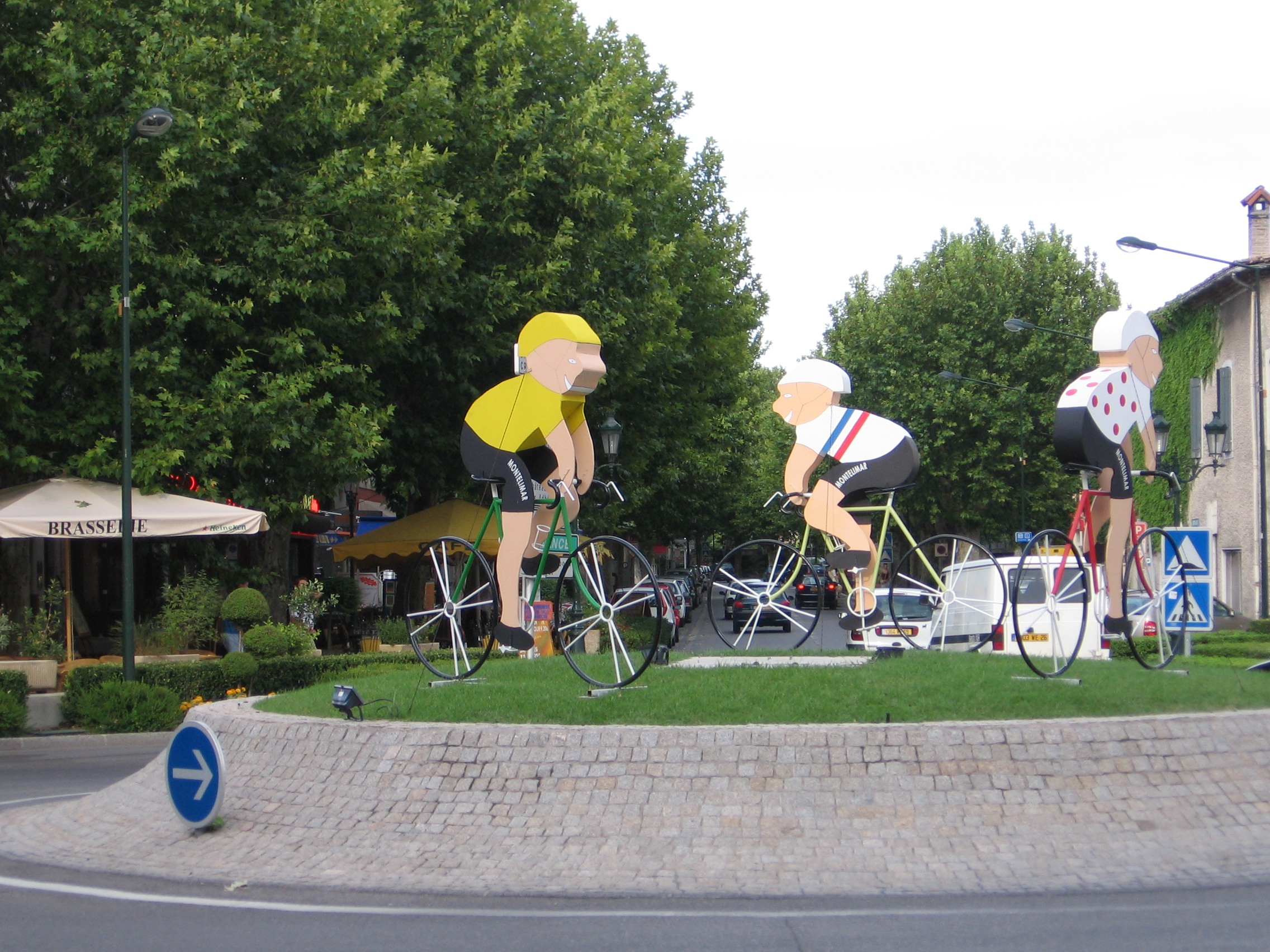 Roundabout, tour_de_france, Montelimar